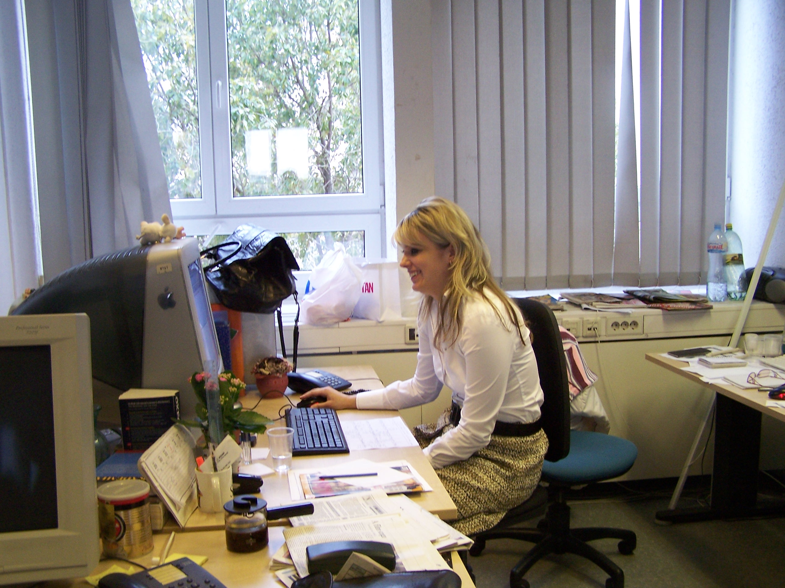 A Bors című bulvárlap egyik munkatársa (Budapest XIV., Róna utca)